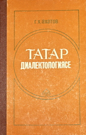 Г. Х. АХАТОВ. "ТАТАРСКАЯ ДИАЛЕКТОЛОГИЯ" (1984) - первый официальный учебник, изданный в СССР по татарской диалектологии.